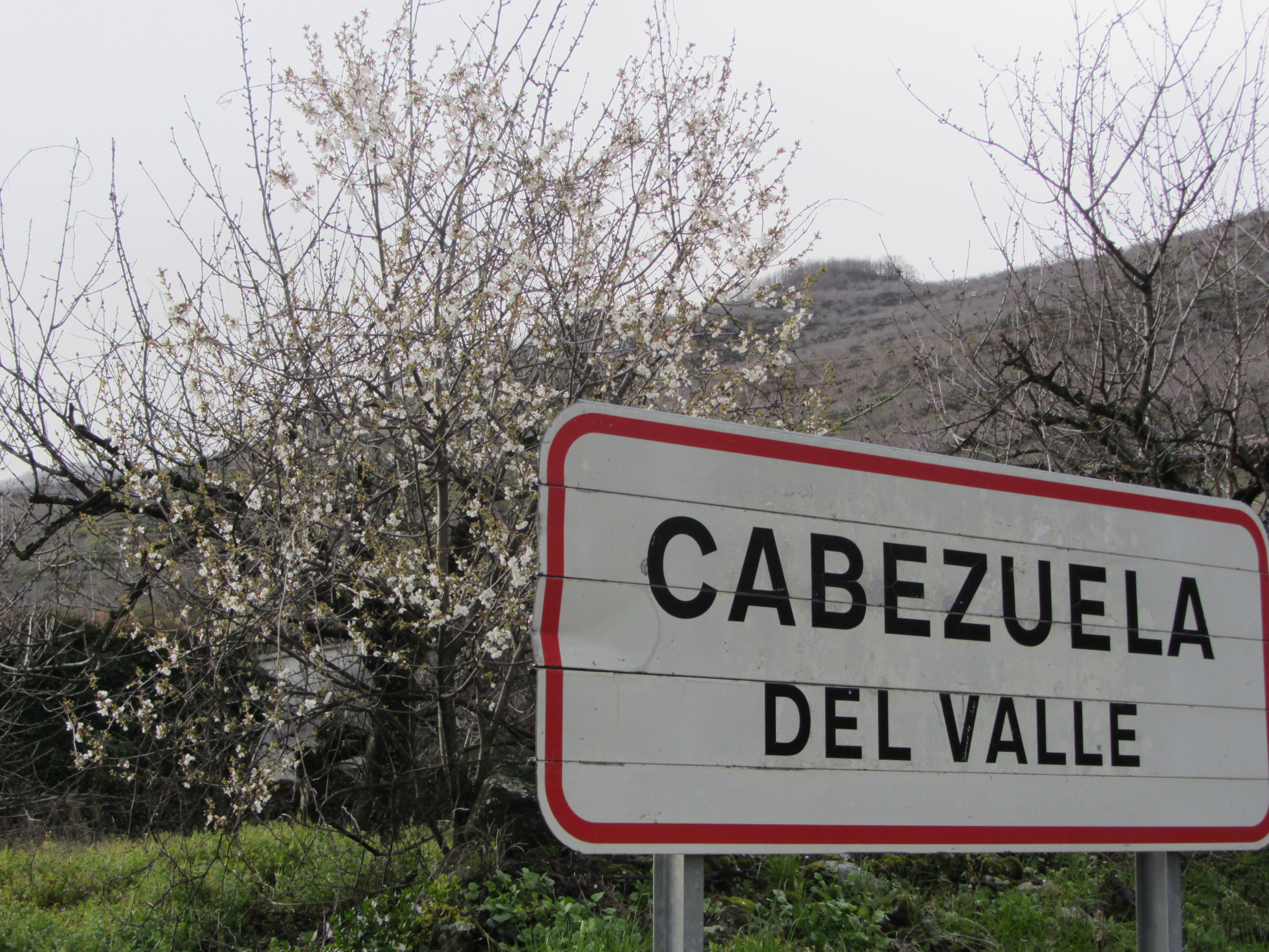 Gereziondo loreduna herriaren sarreran.